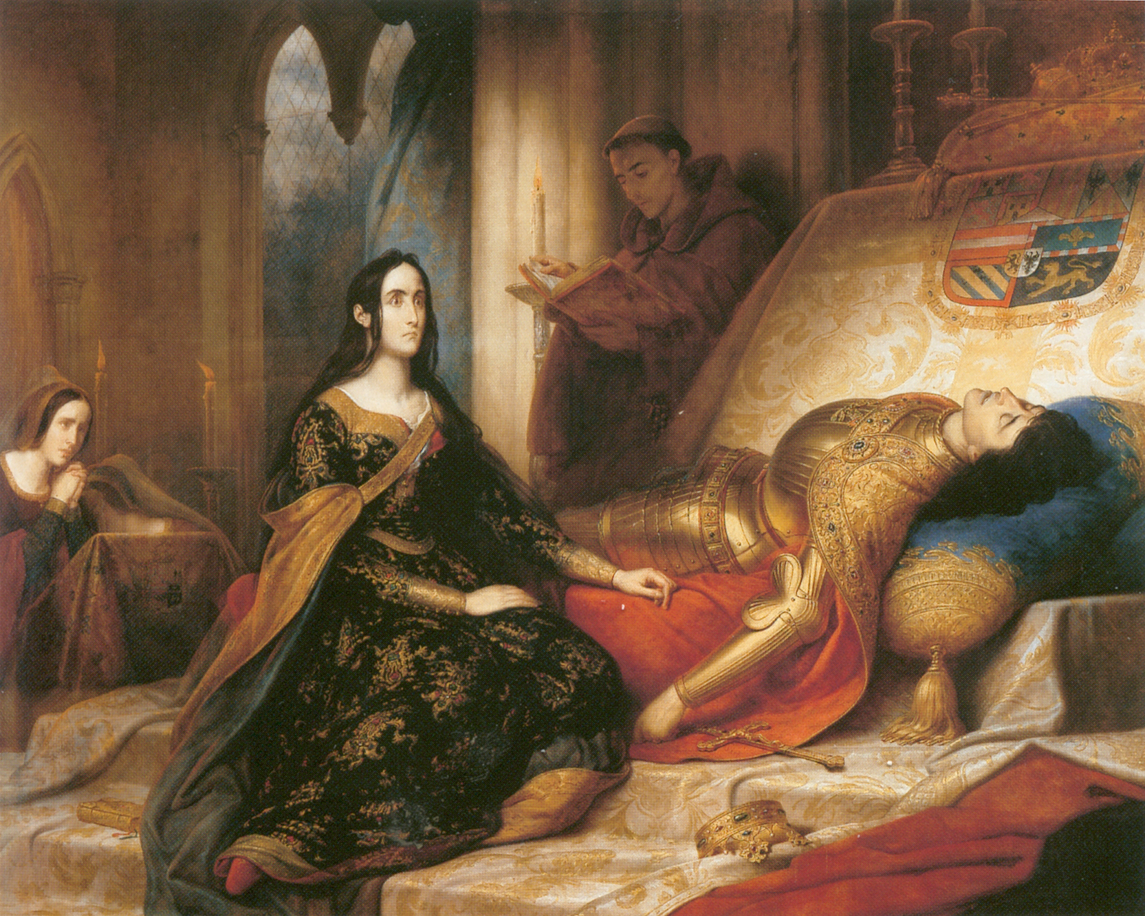 Juana la Loca, de Charles de Steuben. La pintura se expone en el Palacio de Bellas Artes de Lille.